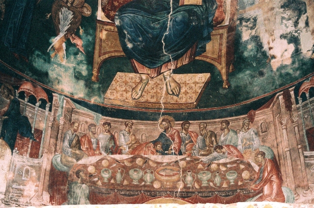 უბისა